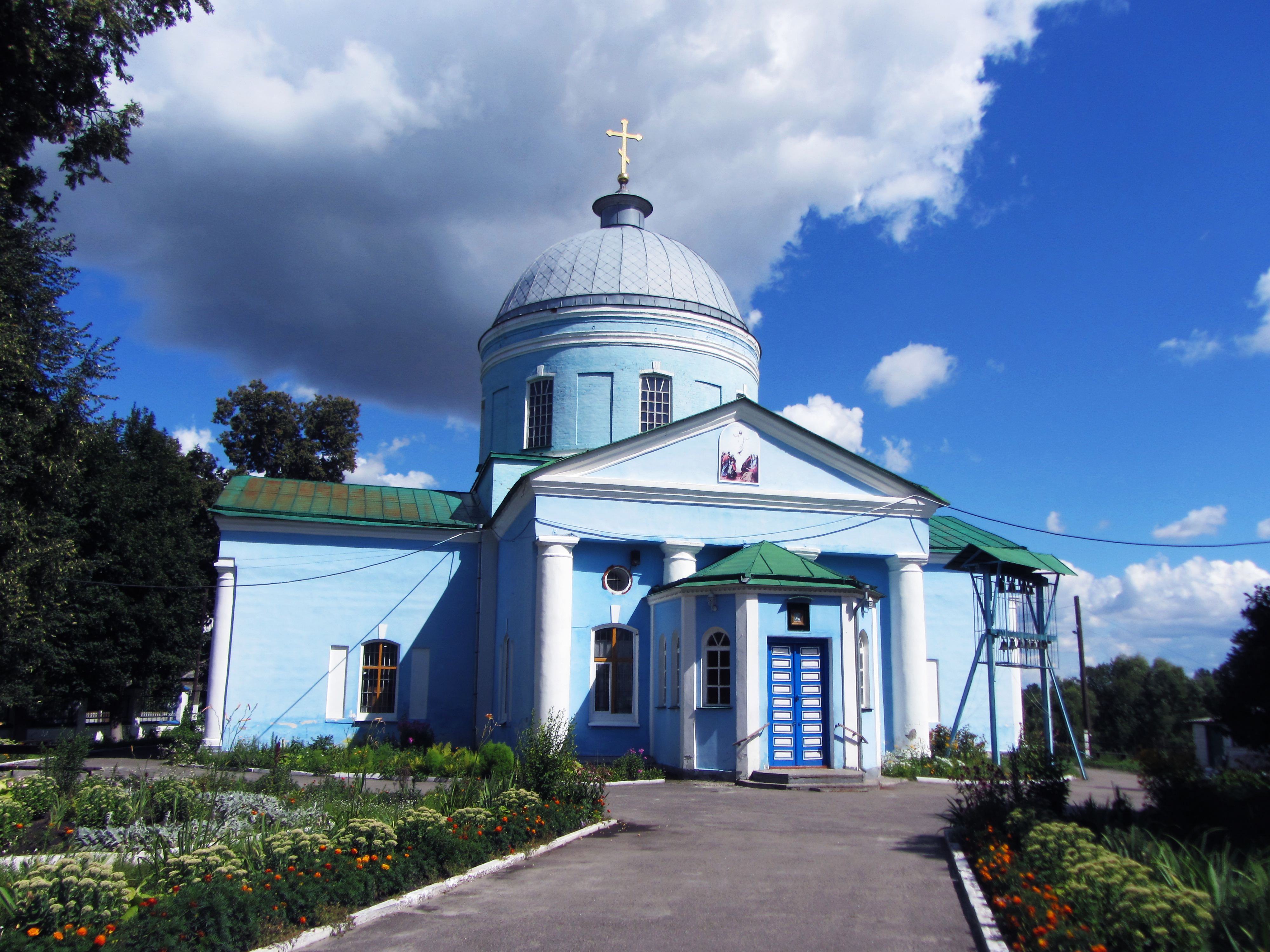 Вознесенська церква, Конотоп, пров. Свердлова, 4.